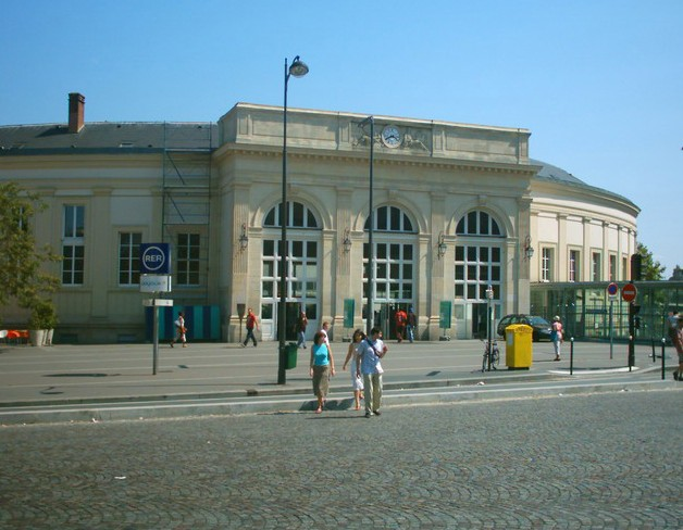 Denfert-Rochereau Station, Paris.